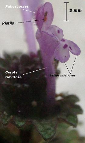 Lamium amplexicaule plant